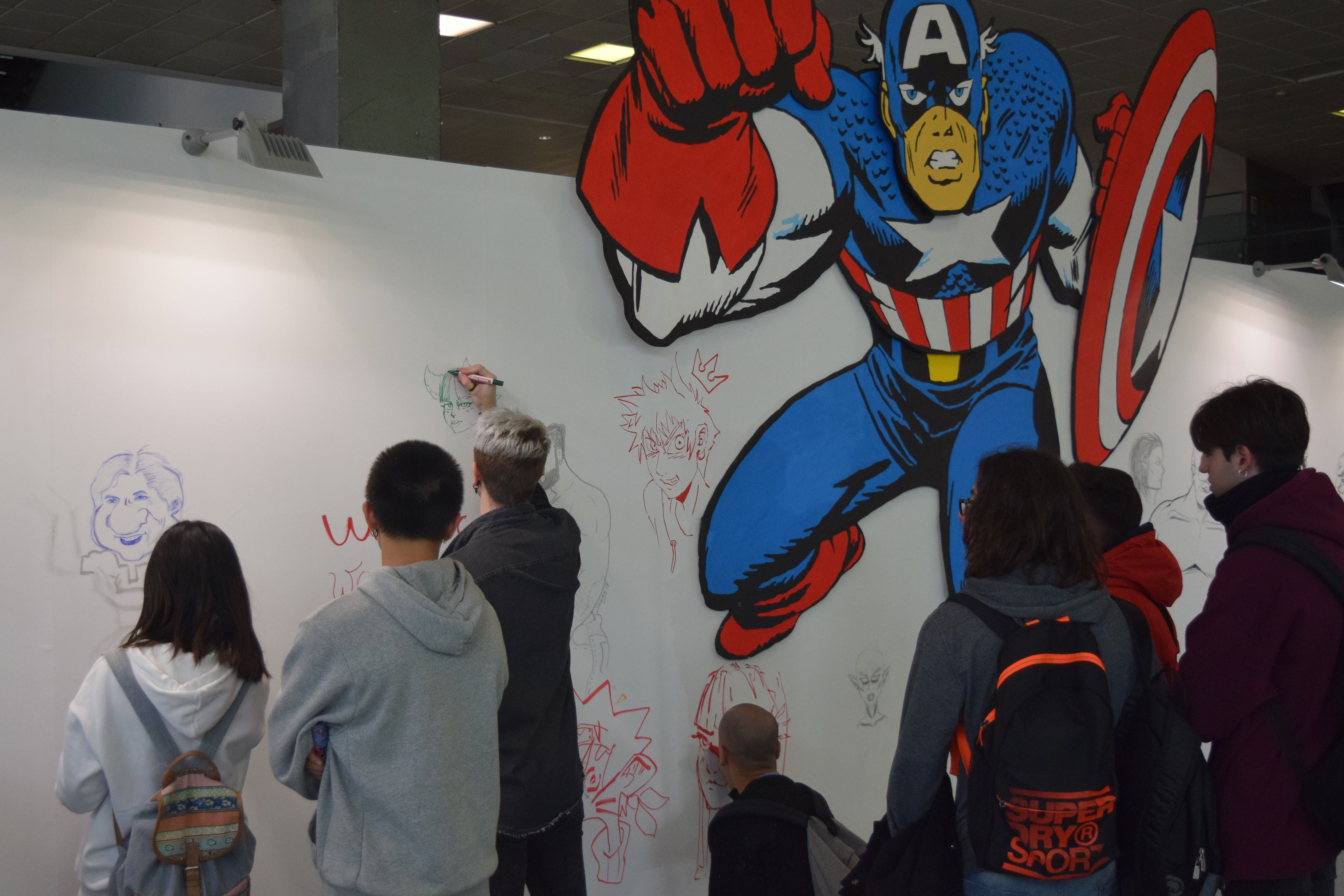 Exposició Stan Lee & the american comic book. Zona lliure de dibuis. 37 comic Barcelona.